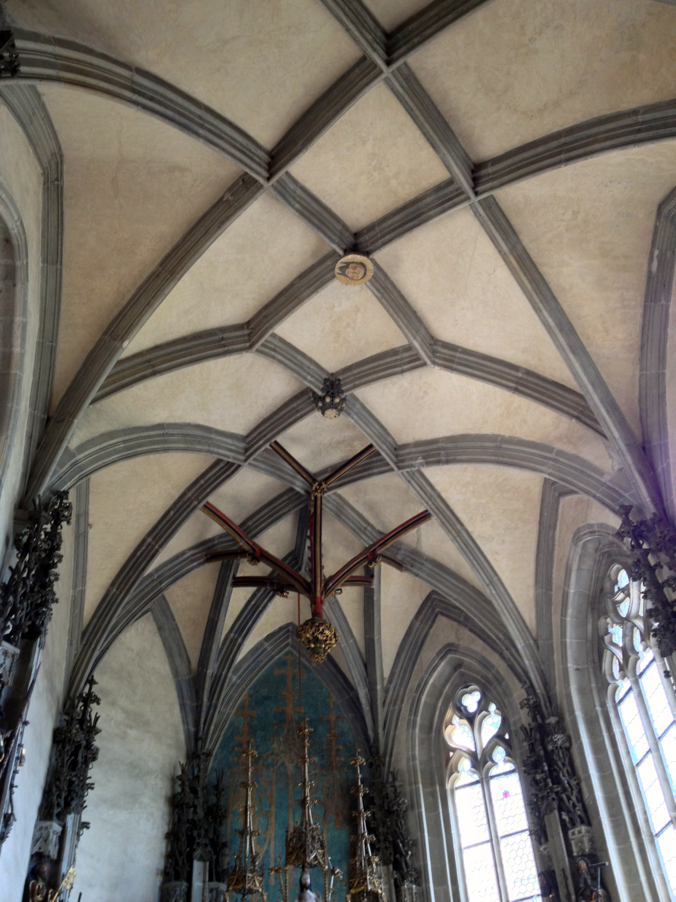 klenba